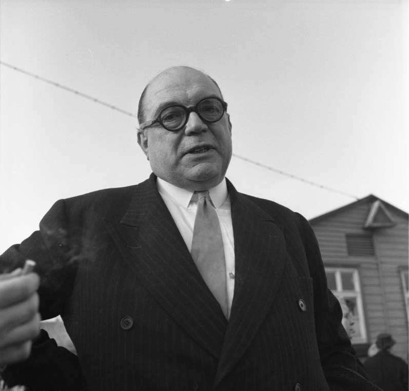 Lager Friedland Ankunft der Wissenschaftler aus Sochumi brit. Journalist Sefton DELMER im Gespräch mit den Wissenschaftlern und deren Angehörigen, 12. Februar - 16. Februar 1958